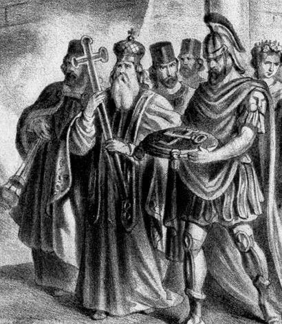 Константинопольский патриарх Николай Мистик